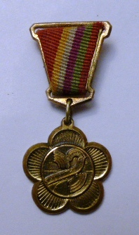 Памятный значок "За активное участие в поготовке и проведении XII Всемирного фестиваля молодёжи и студентов. Vyacheslav Ermakov, Москва. 1985"